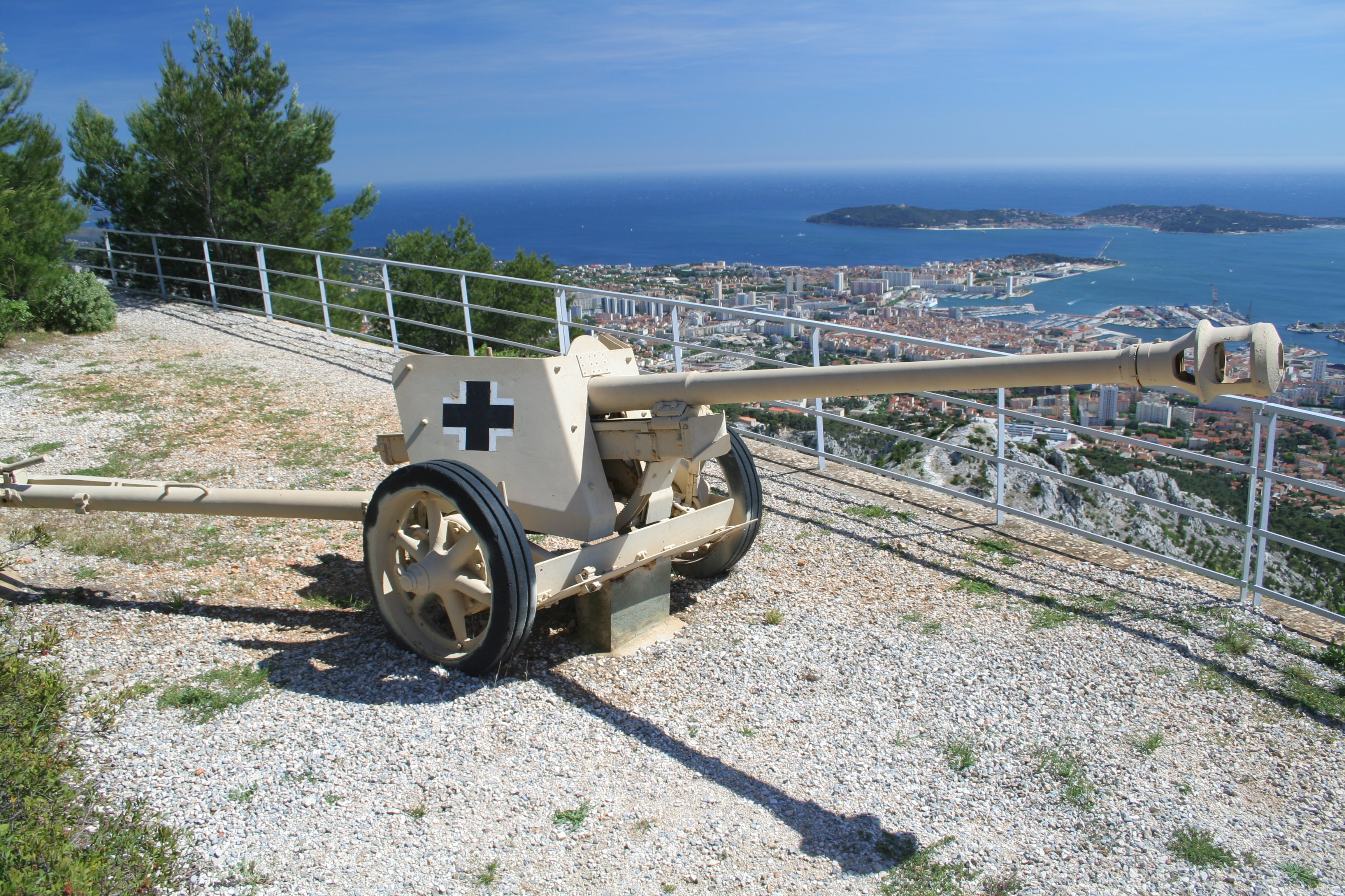 Pièce de 75 mm allemande de la II° Guerre mondiale au mémorial du Mont Faron à Toulon (France)